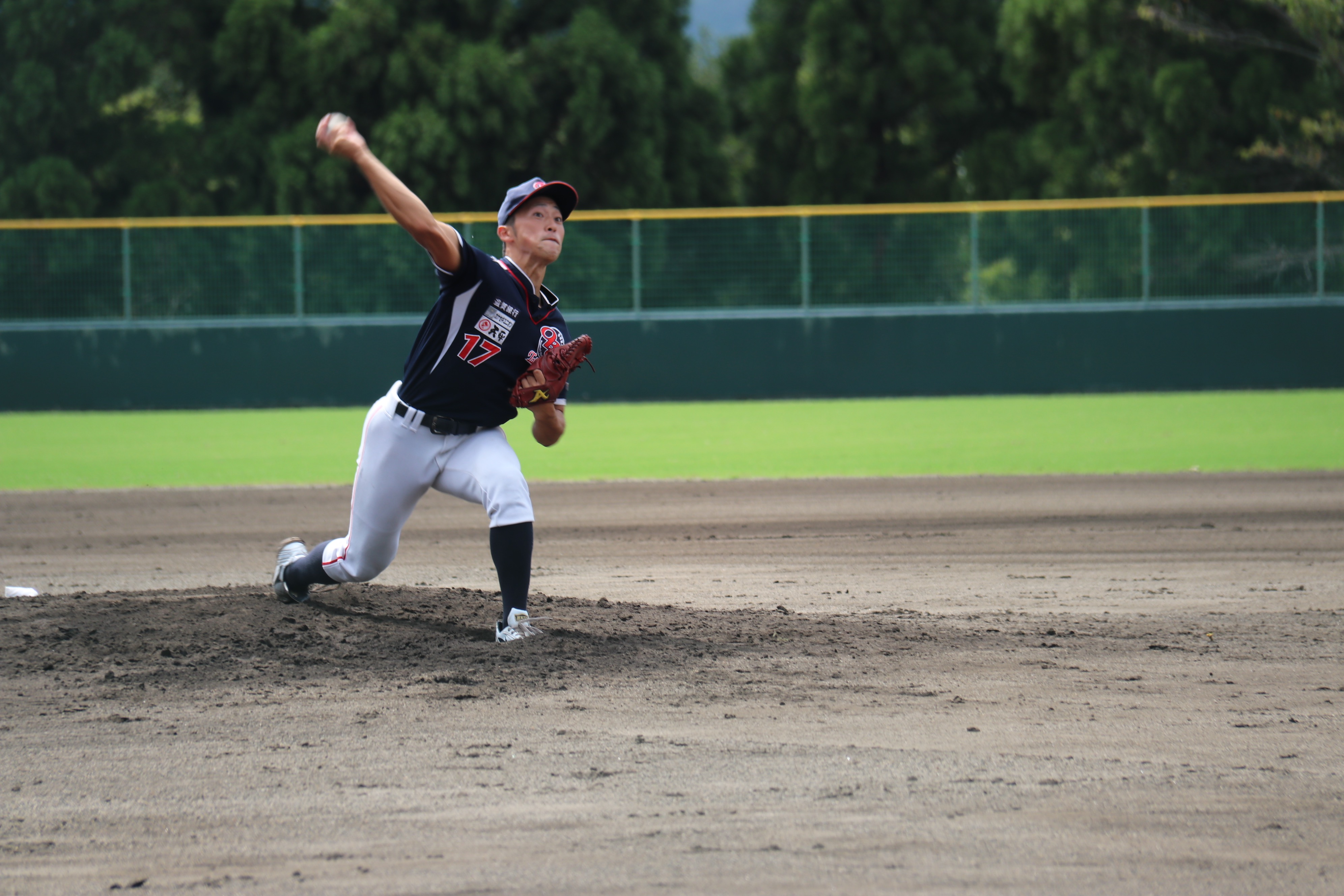 OBC高島 那珂大心